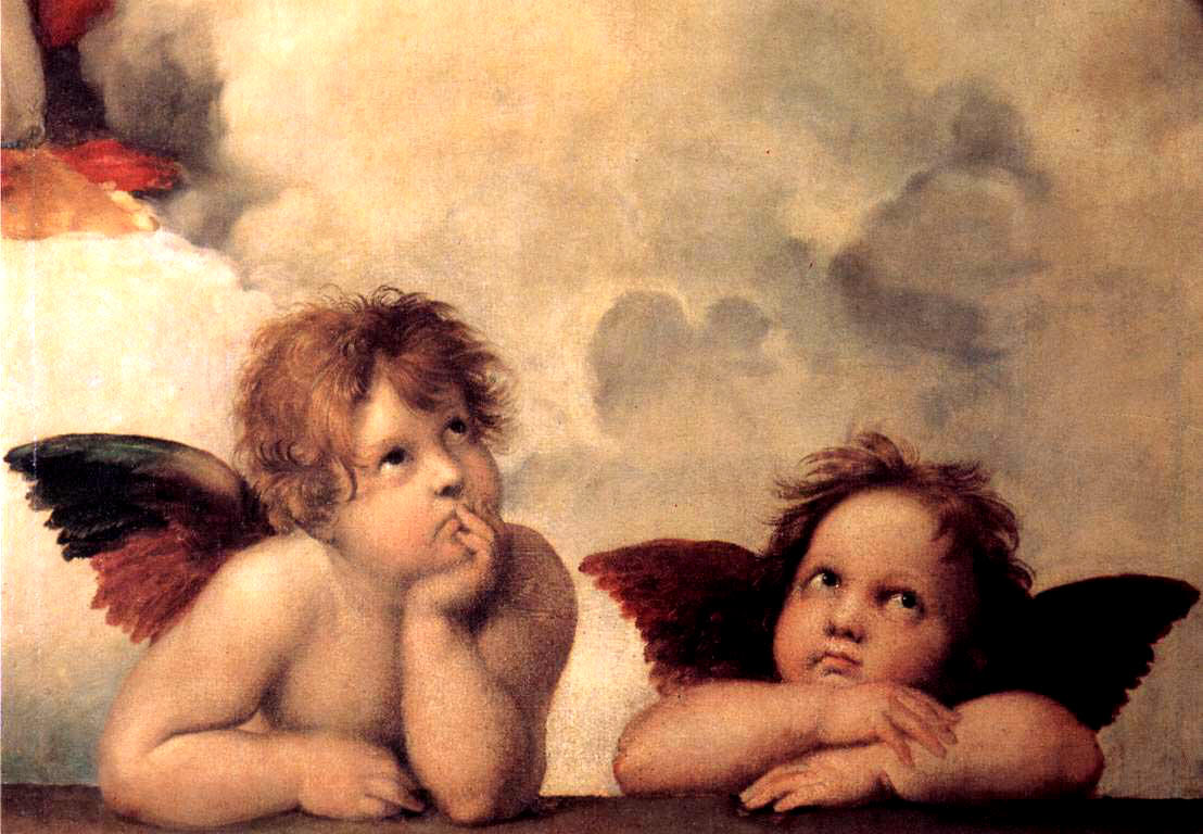 detail Putti (cherubs)